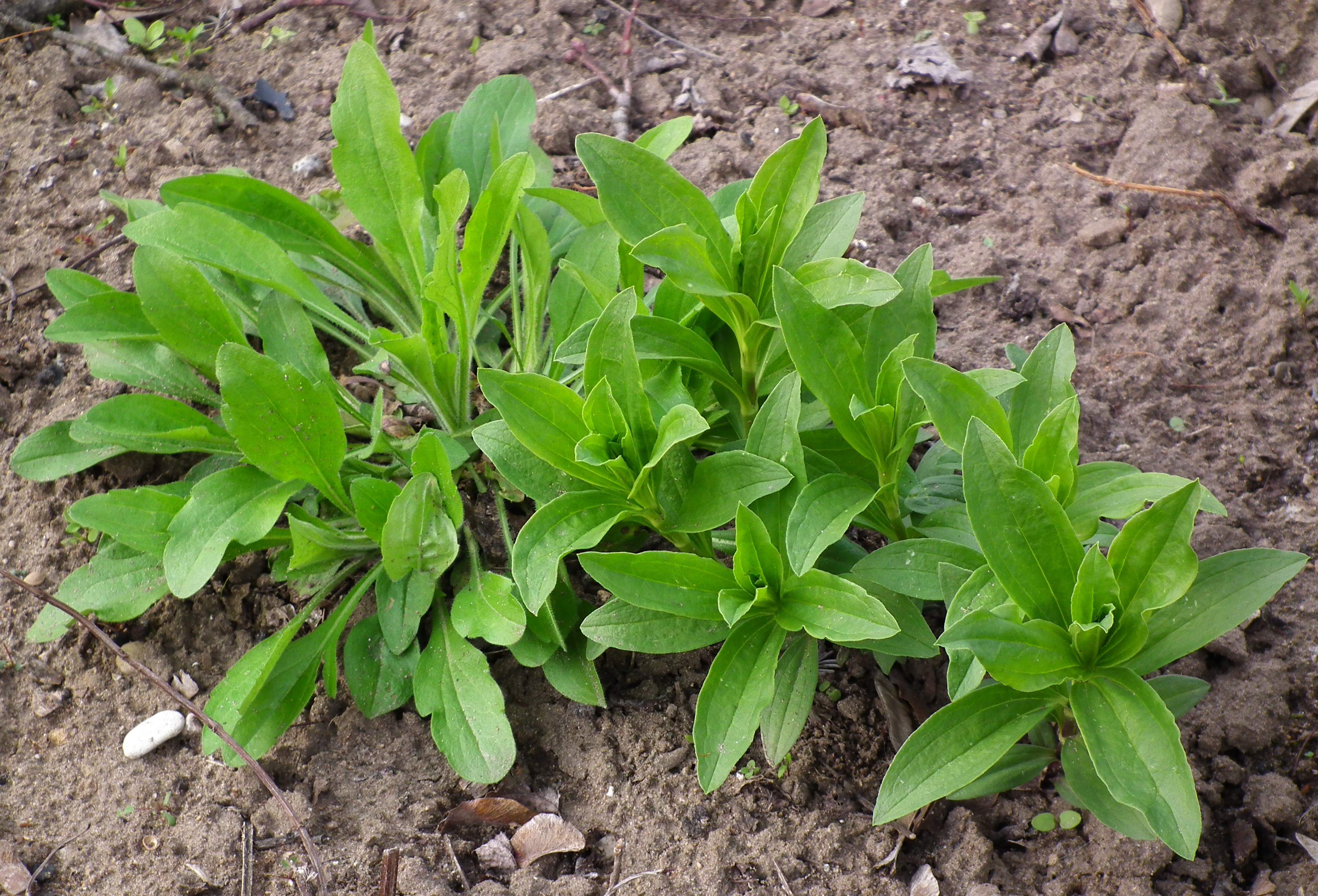 Echter Steinsame (Lithospermum officinale), fotografiert in Südhessen (Deutschland)